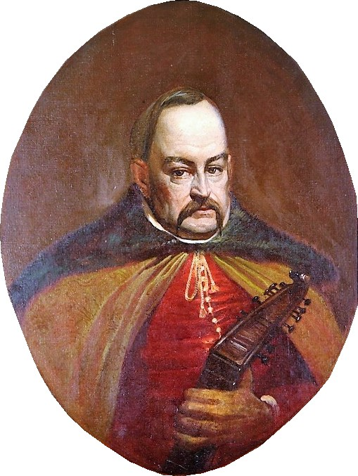 Антон Андреевич Головатый (1732(1732)-1797) — казачий атаман, войсковой судья, полковник русской армии, один из основателей и талантливый администратор Черноморского казачьего войска, инициатор переселения черноморских казаков на Кубань.